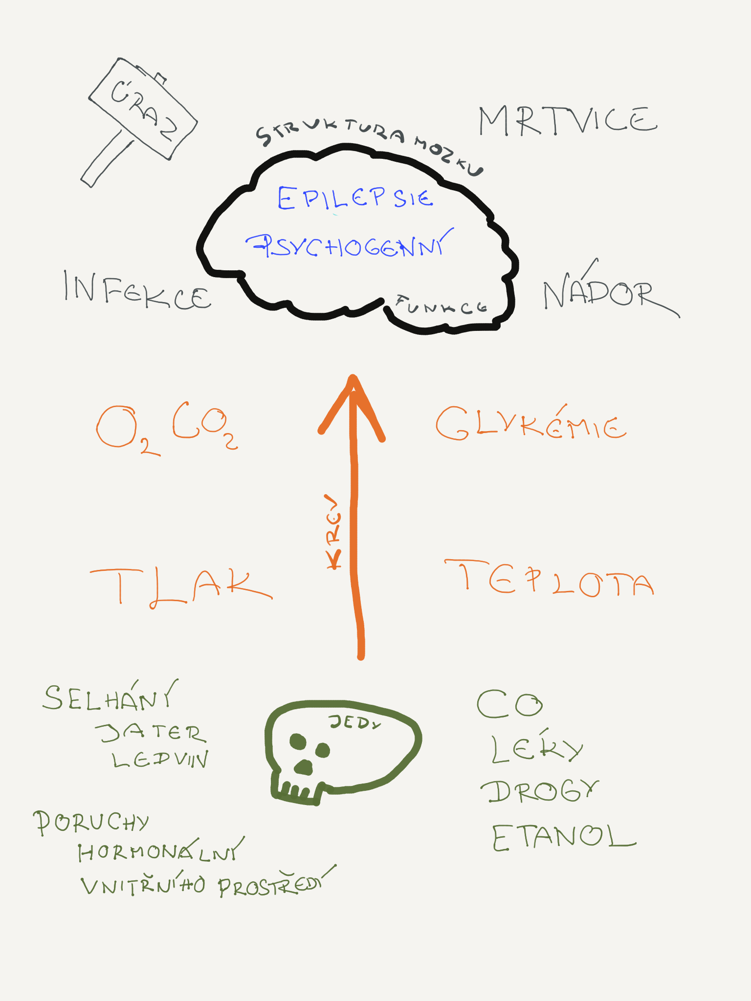 Způsob jak zapamatovat příčiny bezvědomí - rozdělením do 4 skupin. Vhodné pro diferenciální diagnostiku poruch vědomí a celotělových křečí